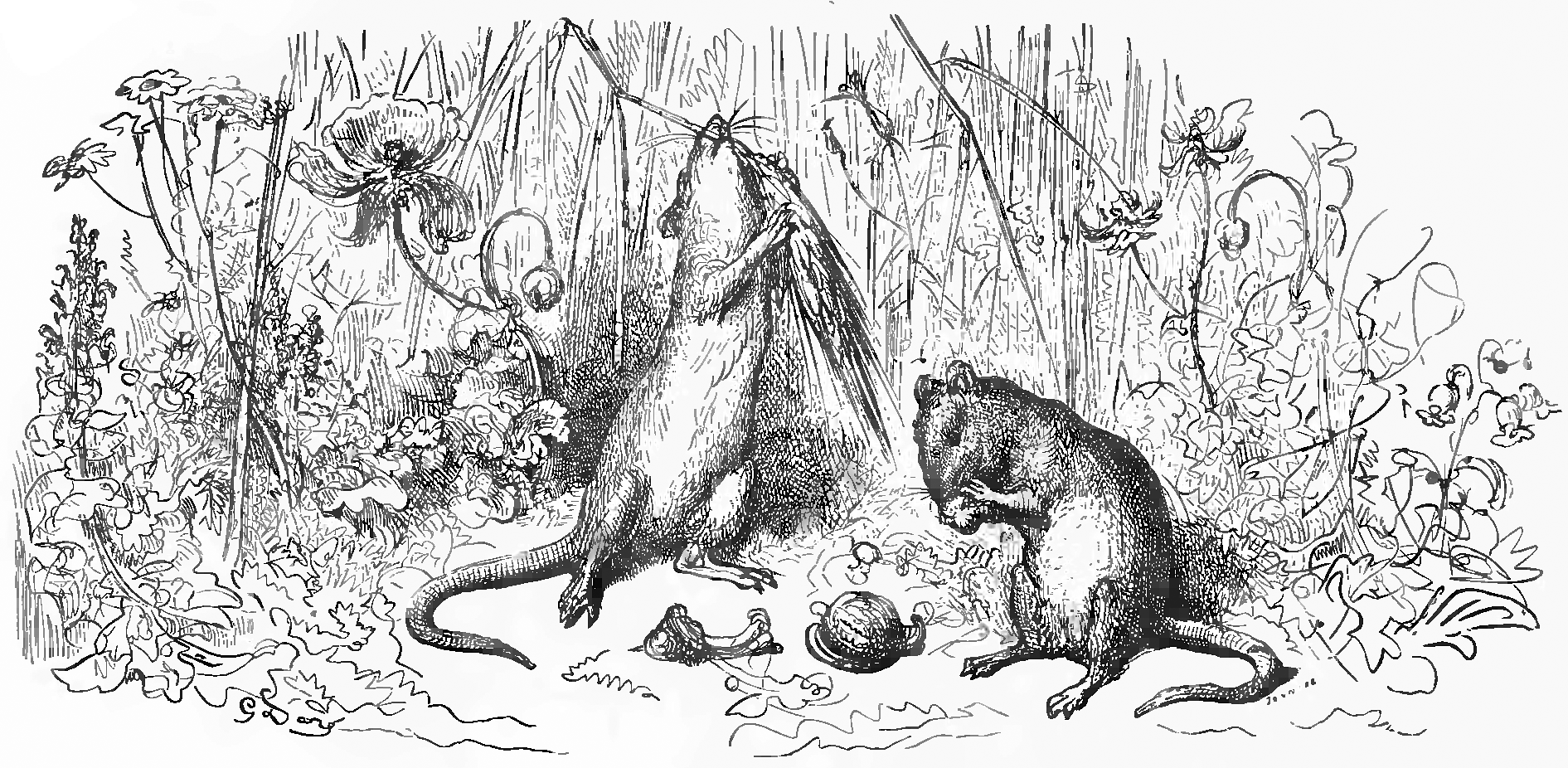 grafika z książki PL Bajki, Jean de La Fontaine, nakładem i drukiem Jana Noskowskiego, Warszawa 1876